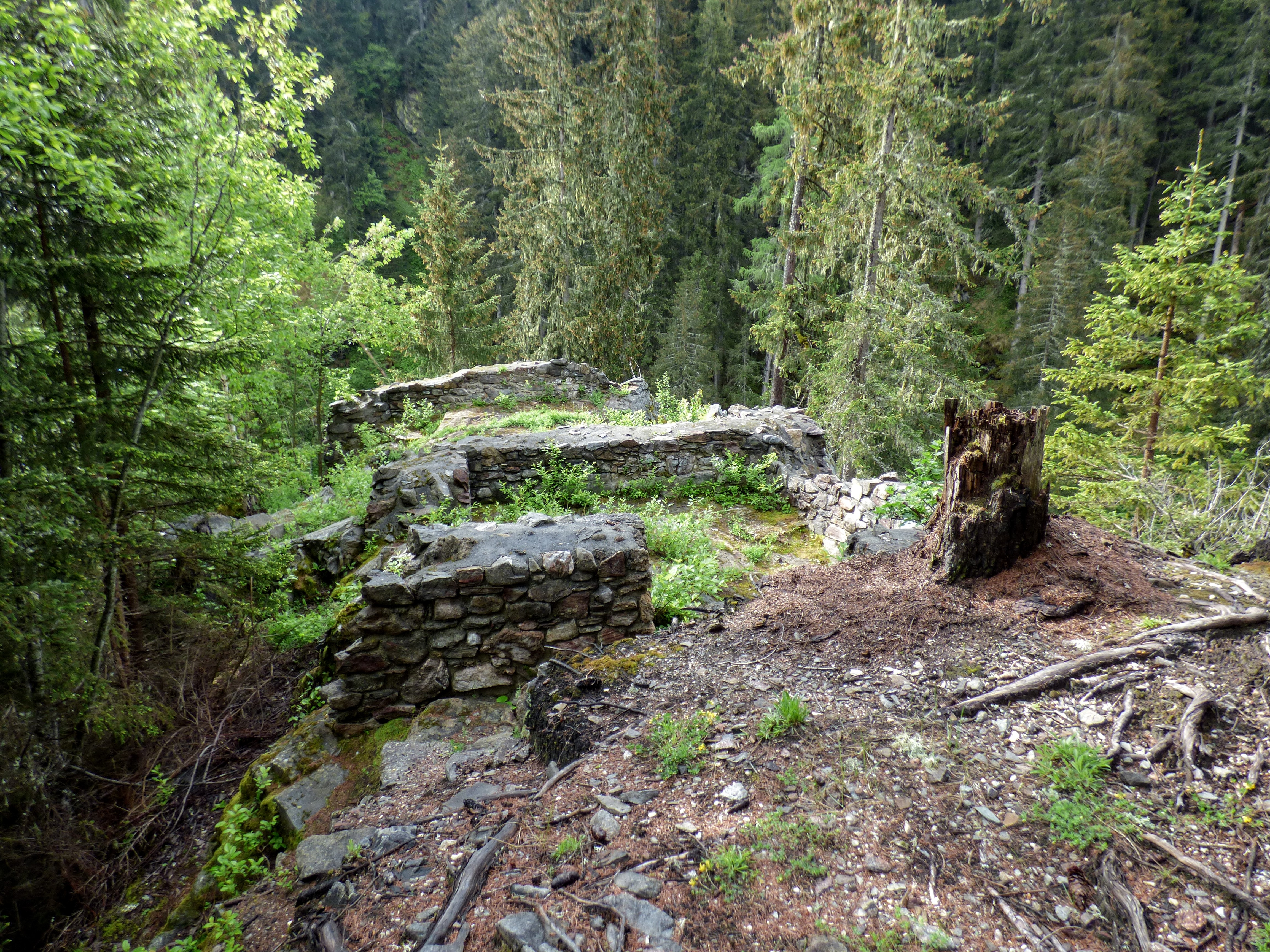 Ruine Edenvest, Gemeinde Thomatal (Salzburg)